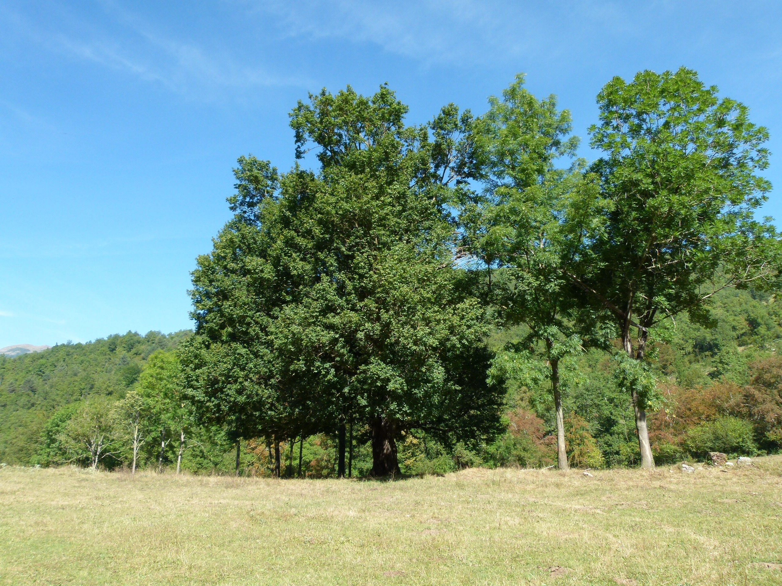 Auró del Remei (Camprodon) This is a a photo of a protected or outstanding tree in Catalonia, Spain, with id: MA-31.039.01